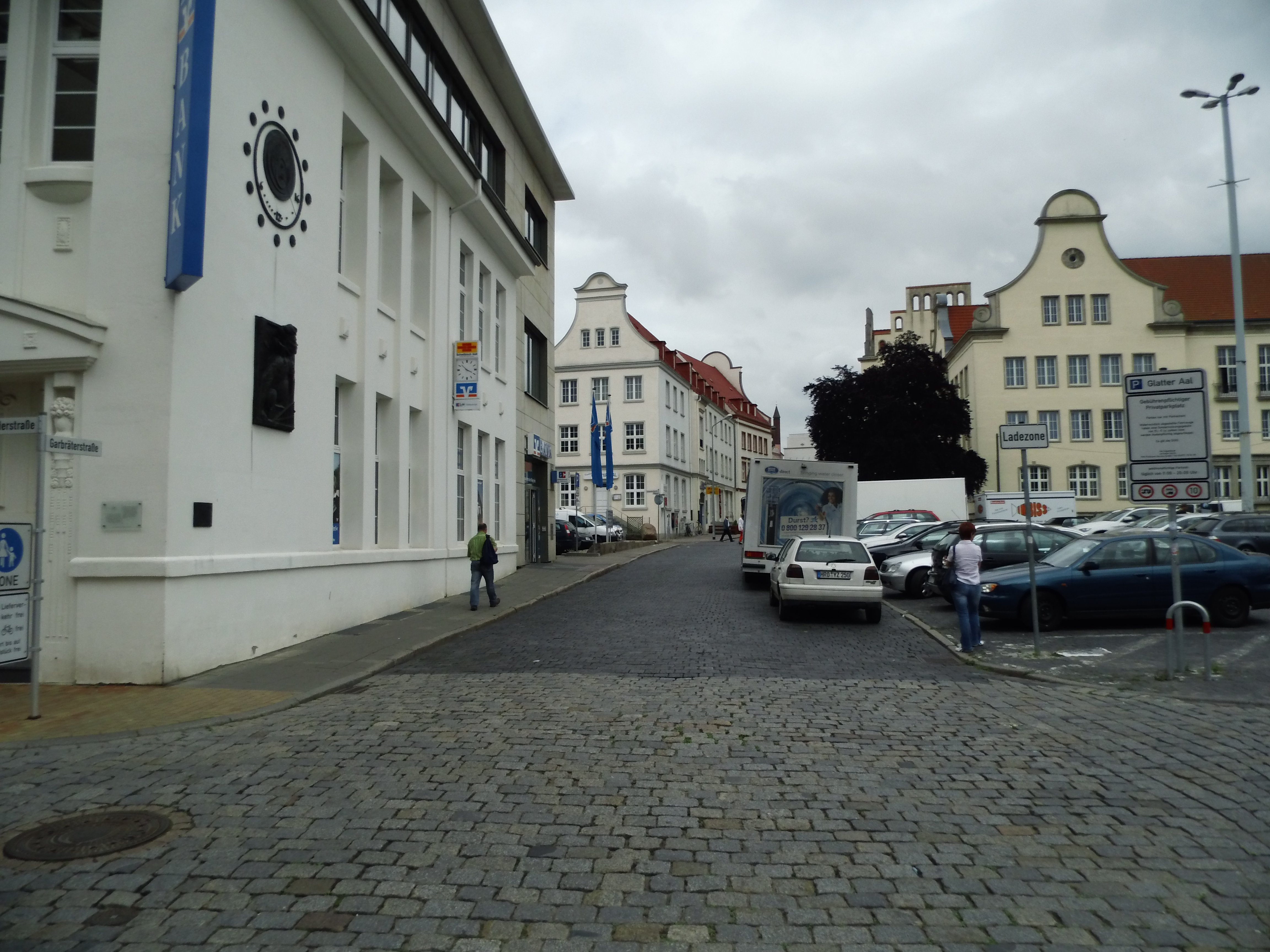 Die Gerbräterstraße in der Rostocker Innenstadt